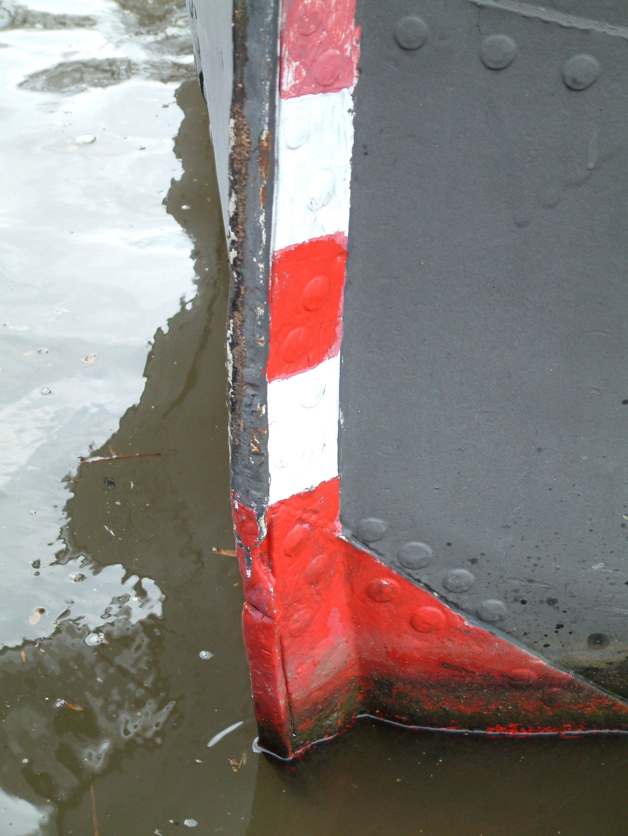 Diepteschaal van een binnenschip Categorie:Binnenvaart